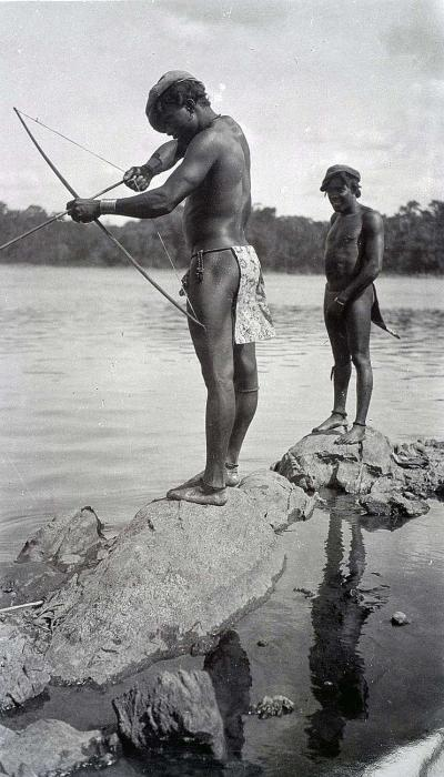 Negatief. Marrons schieten vis met pijl en boog